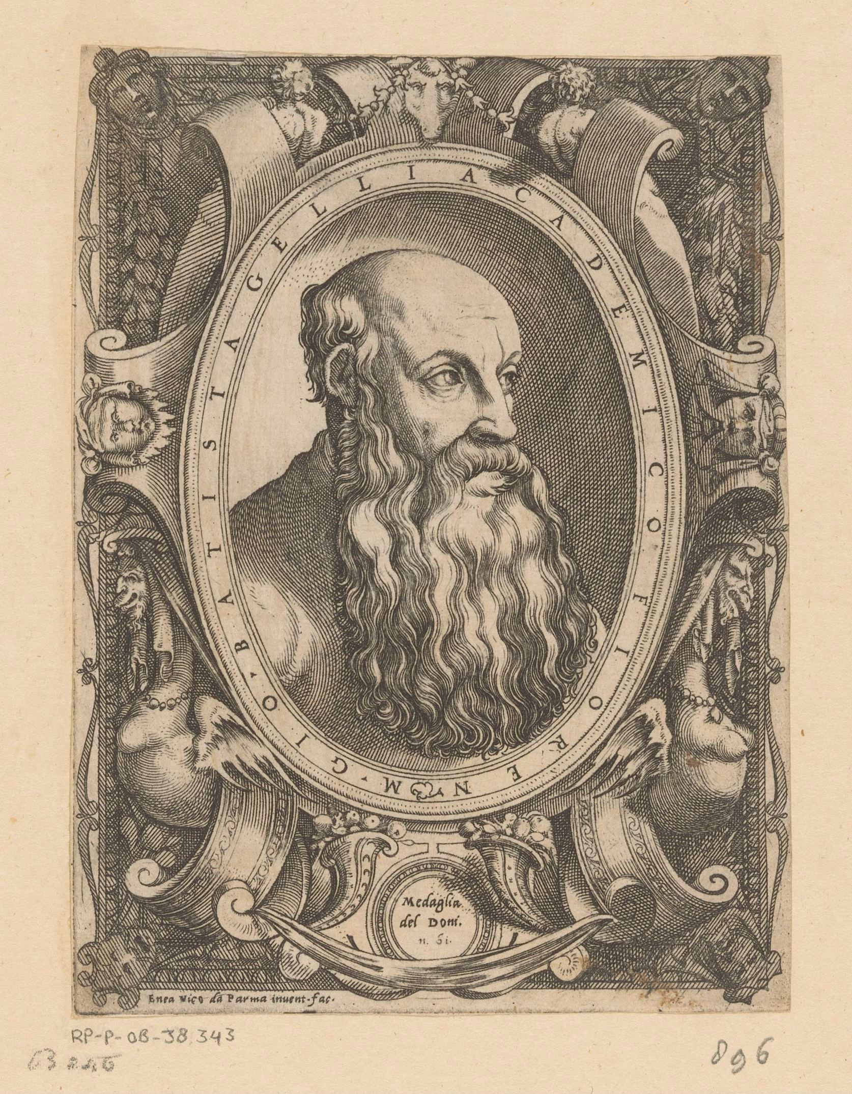 IdentificatieTitel(s): Portret van dichter en filosoof Giovan Battista GelliPenningen van Anton Francesco Doni (serietitel)Medaglie del Doni (serietitel)Objecttype: prent Objectnummer: RP-P-OB-38.343Catalogusreferentie: The Illustrated Bartsch 246Bartsch 246Opschriften / Merken: verzamelaarsmerk, verso, gestempeld: Lugt 12Omschrijving: Portret van Giovan Battista Gelli, gevat in een geornamenteerde lijst.VervaardigingVervaardiger: prentmaker: Enea Vico (vermeld op object)naar eigen ontwerp van: Enea Vico (vermeld op object)Plaats vervaardiging: ItaliëDatering: 1550Fysieke kenmerken: gravureMateriaal: papier Techniek: graveren (drukprocedé)Afmetingen: blad: h 150 mm (binnen plaatrand afgesneden) × b 112 mm (binnen plaatrand afgesneden)OnderwerpWat: historical personsWie: Giovan Battista GelliVerwerving en rechtenVerwerving: onbekend 2006Copyright: Publiek domein